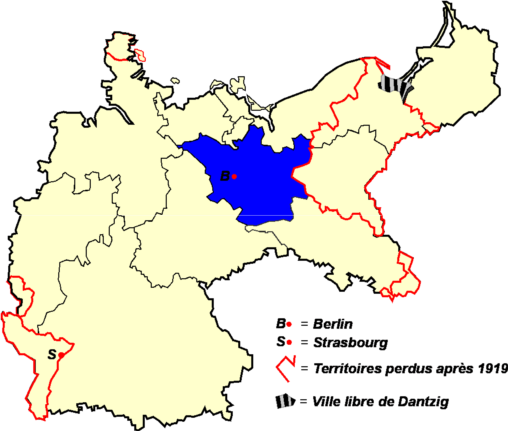 Territoires couverts par la Fédération de football dde Berlin et du Brandebourg (VBB) de 1911 à 1933 Catégorie:Logo Fédérations Allemandes de Football